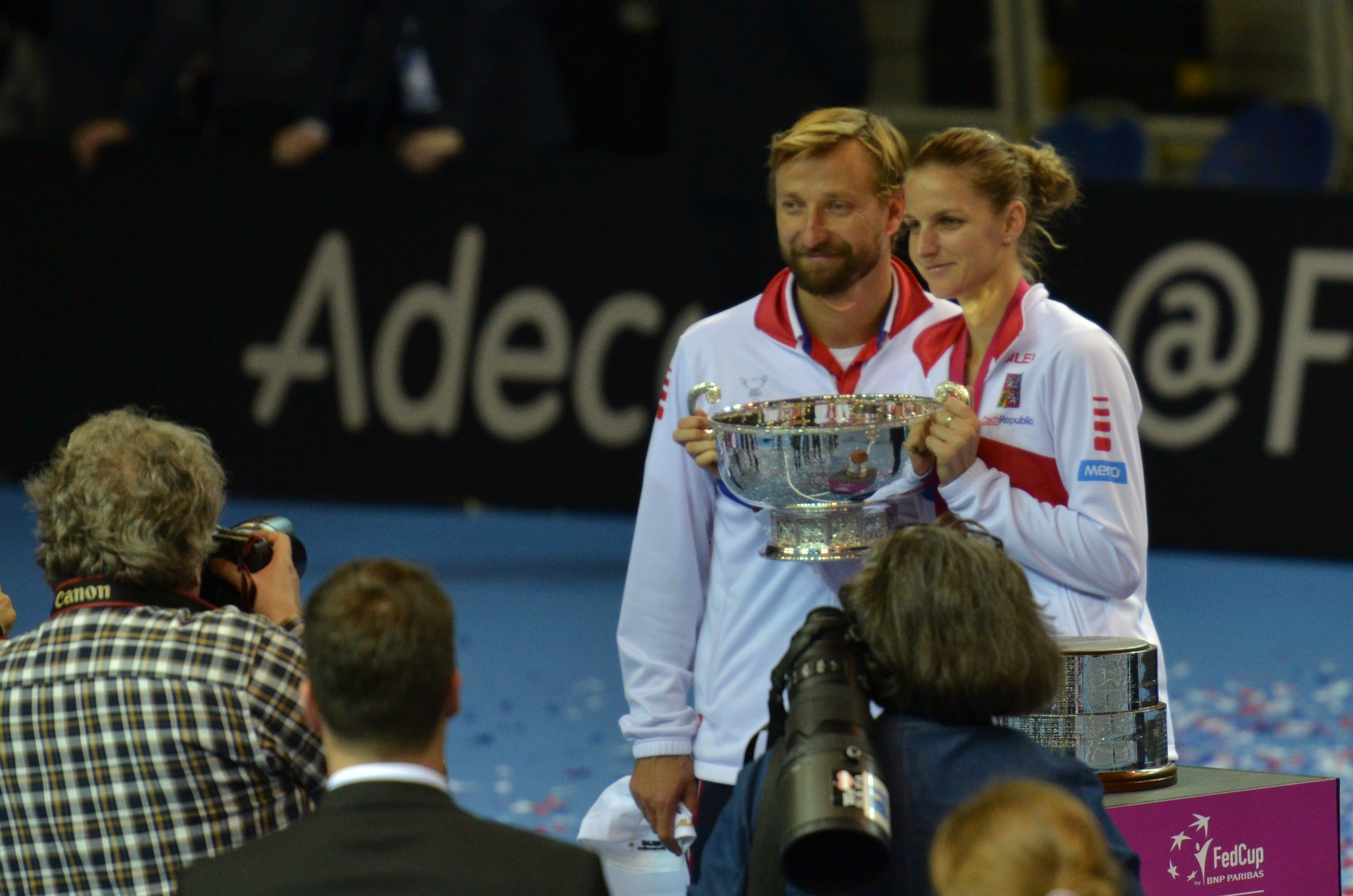 PPP_3559